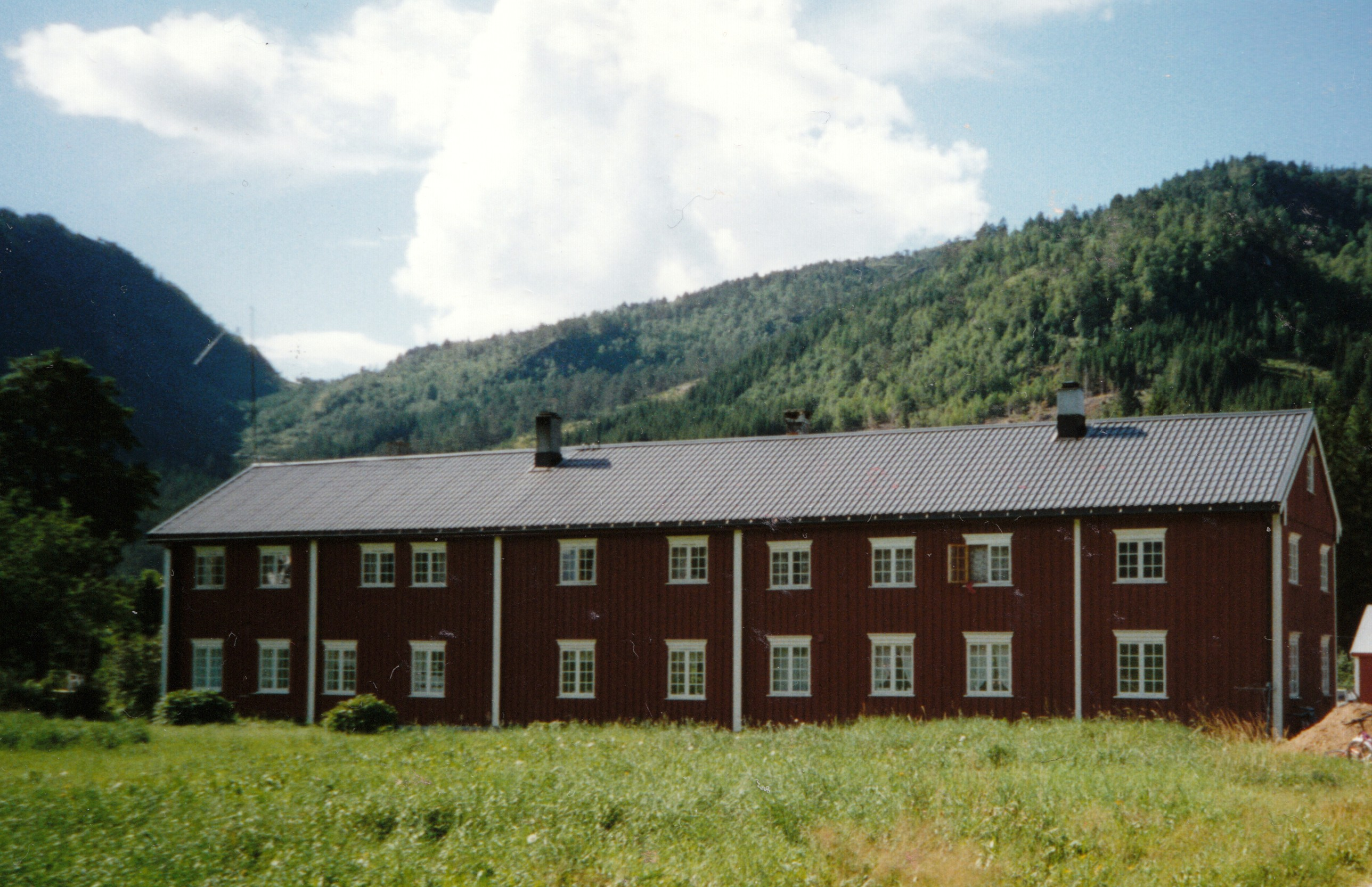 Stor nordmørslån på Ålvundeidet i Sunndal kommune på Nordmøre.